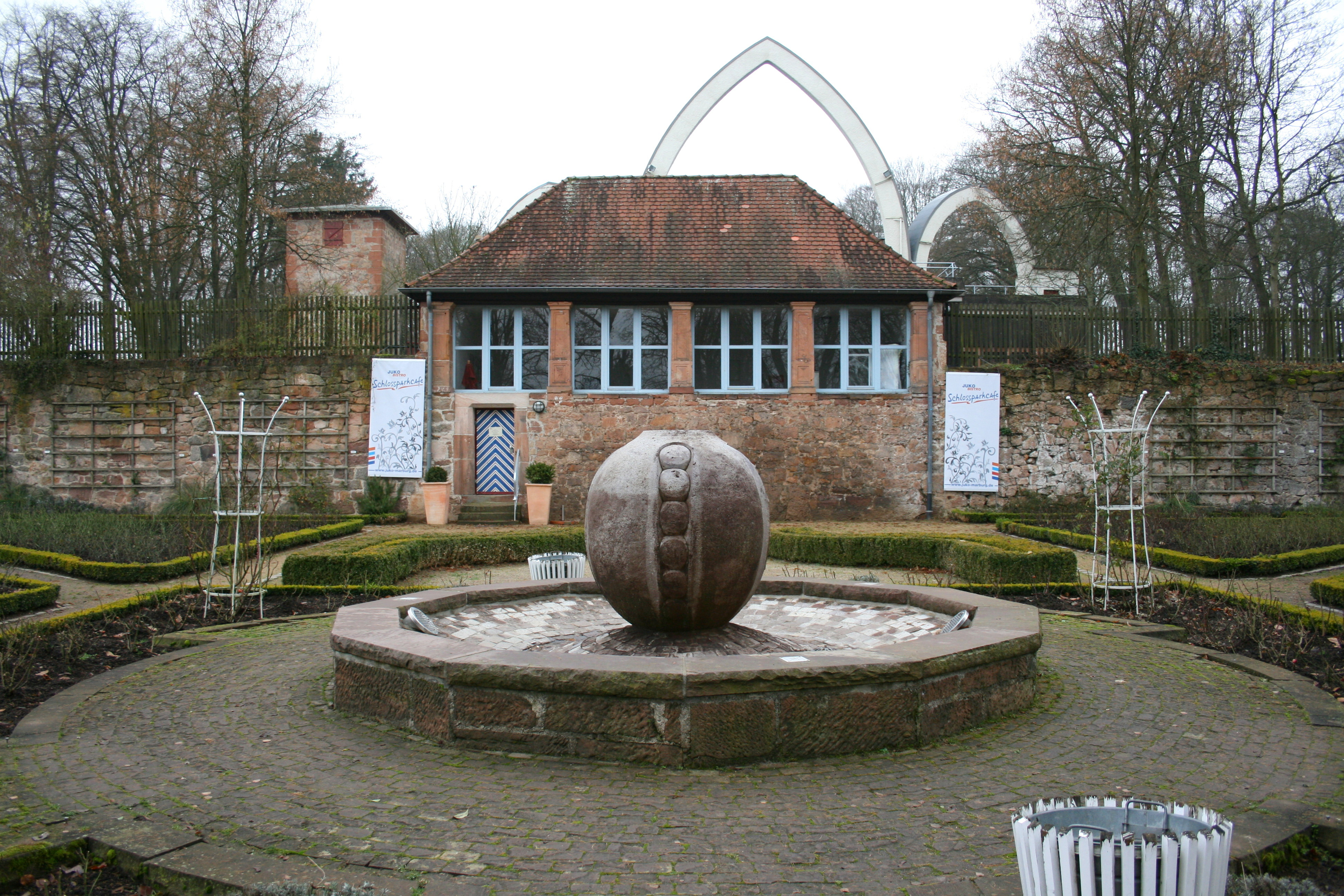 Schlosspark in Marburg